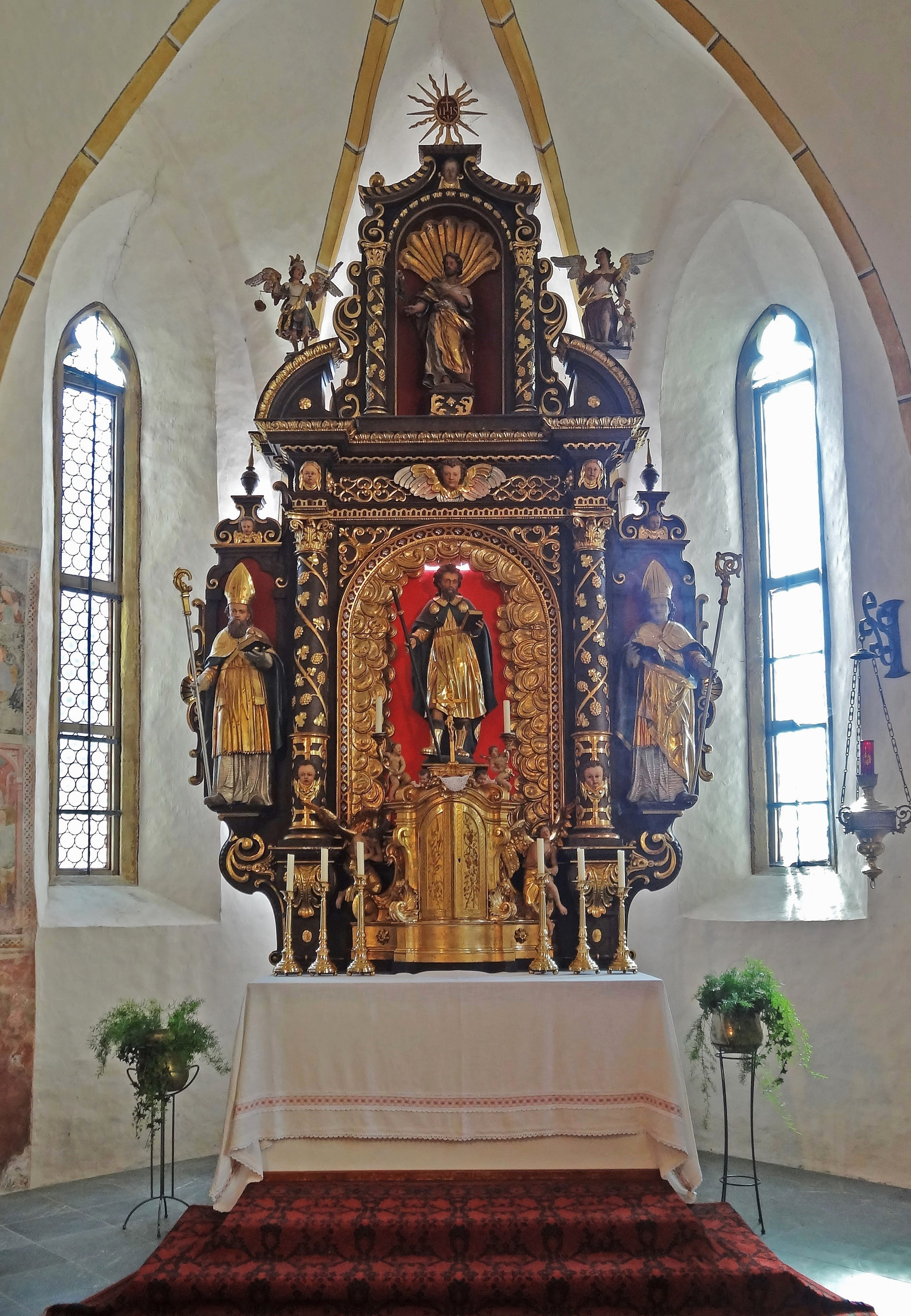 Kath. Pfarrkirche Hl. Jakobus der Ältere (Deutsch-Griffen), der Hochaltar